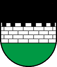 Wappen von Mur Kanton Waadt Schweiz